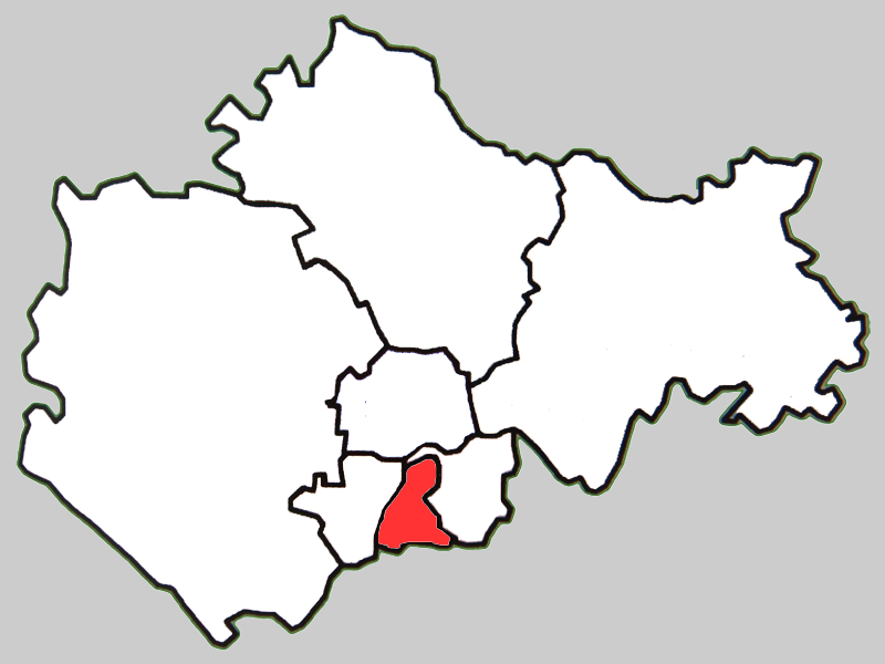 蚌埠市蚌山区地图